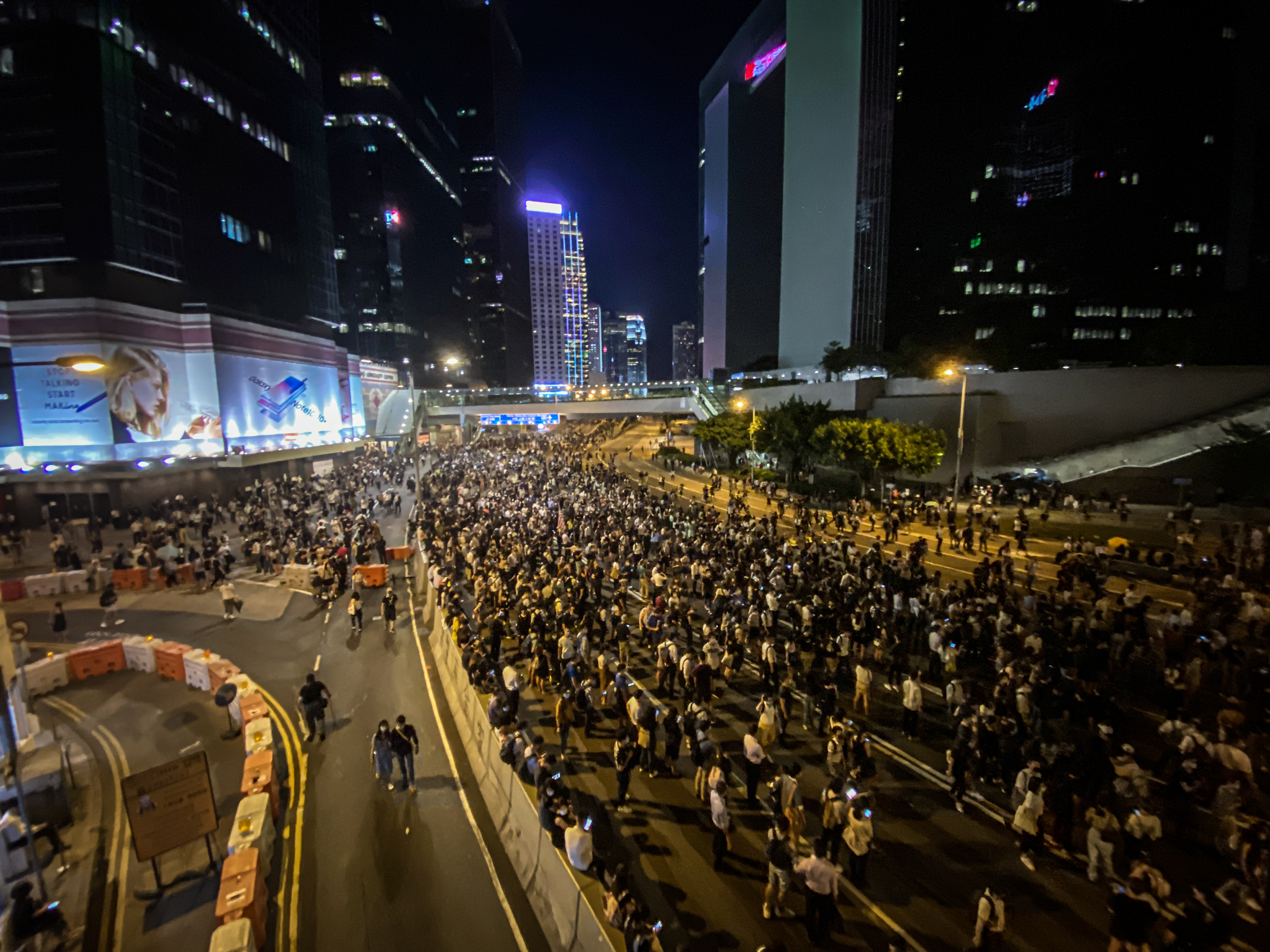 2019-10-04 Protesten in Hong Kong